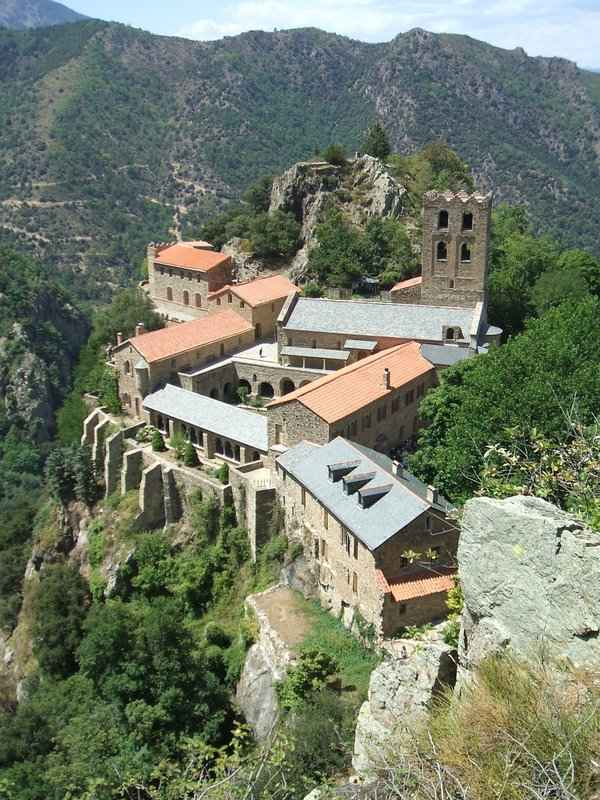 Abadia de Sant Martí del Canigó, a Castell de Vernet (Conflent)